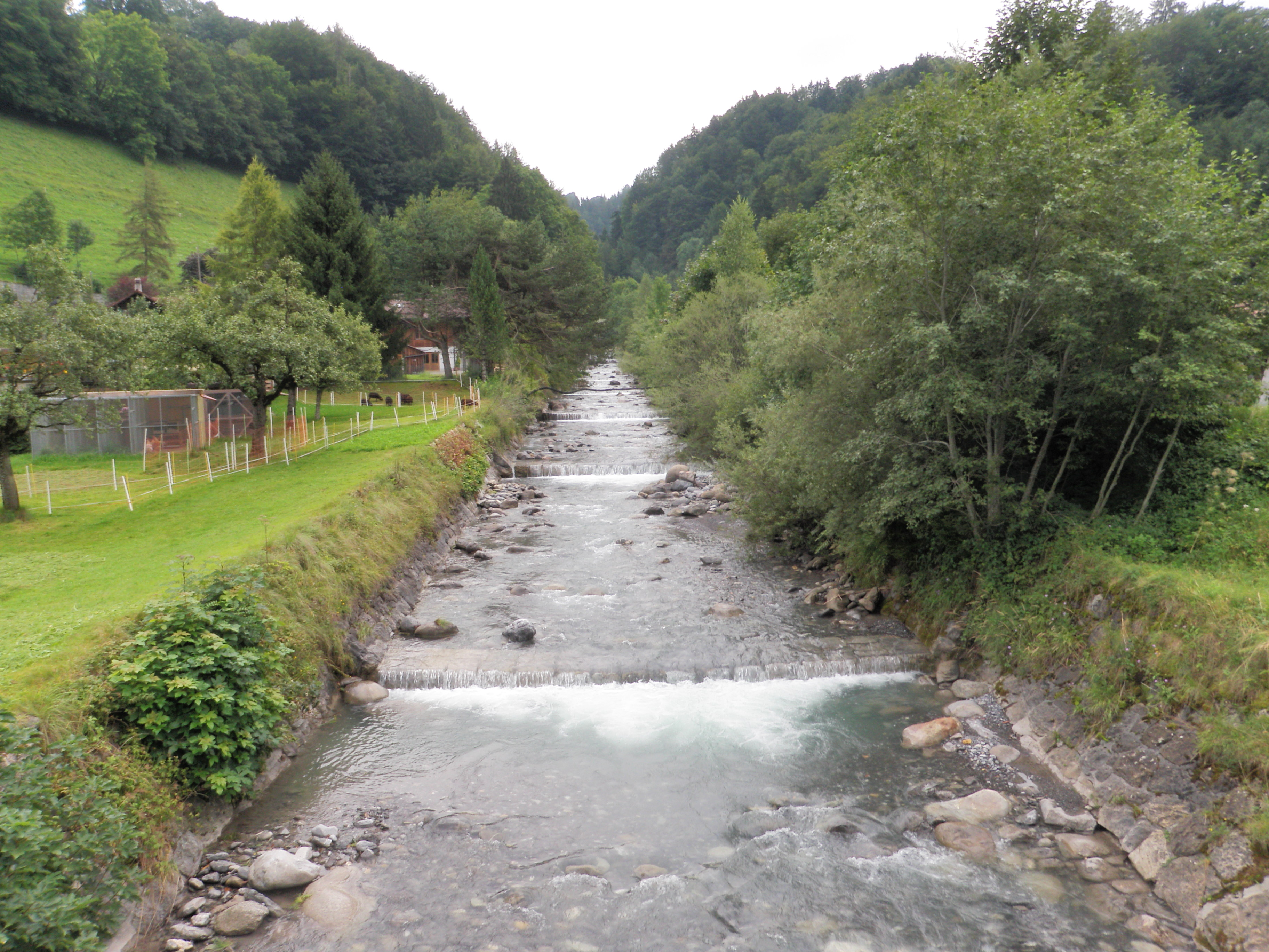 Suld bei Mülenen